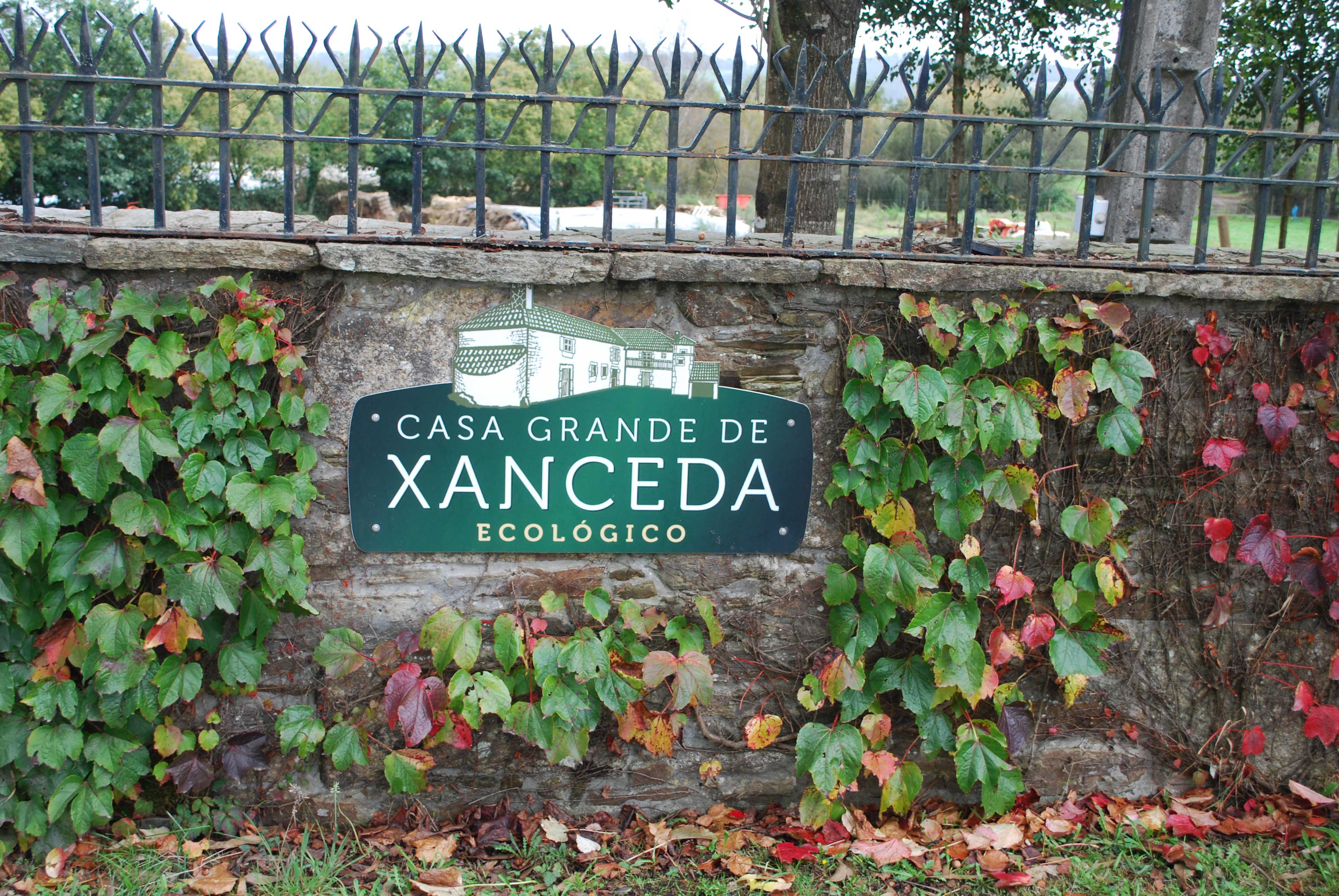 cartel entrada Casa Grande de Xanceda, Mesía